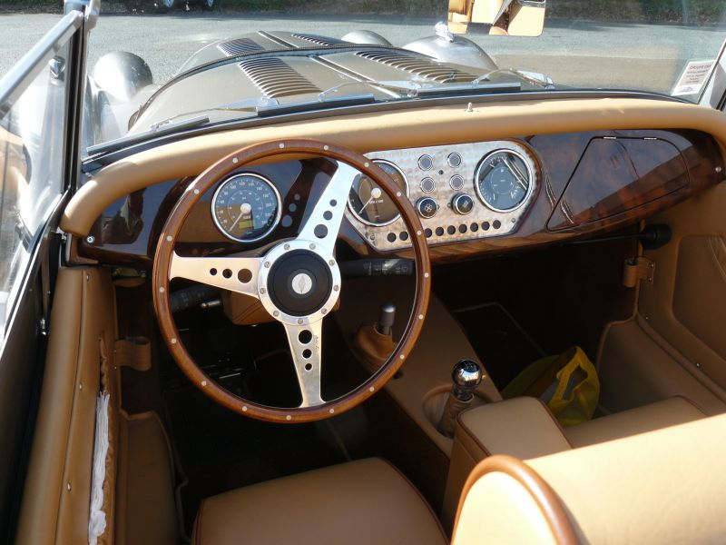 Montlhery 2012